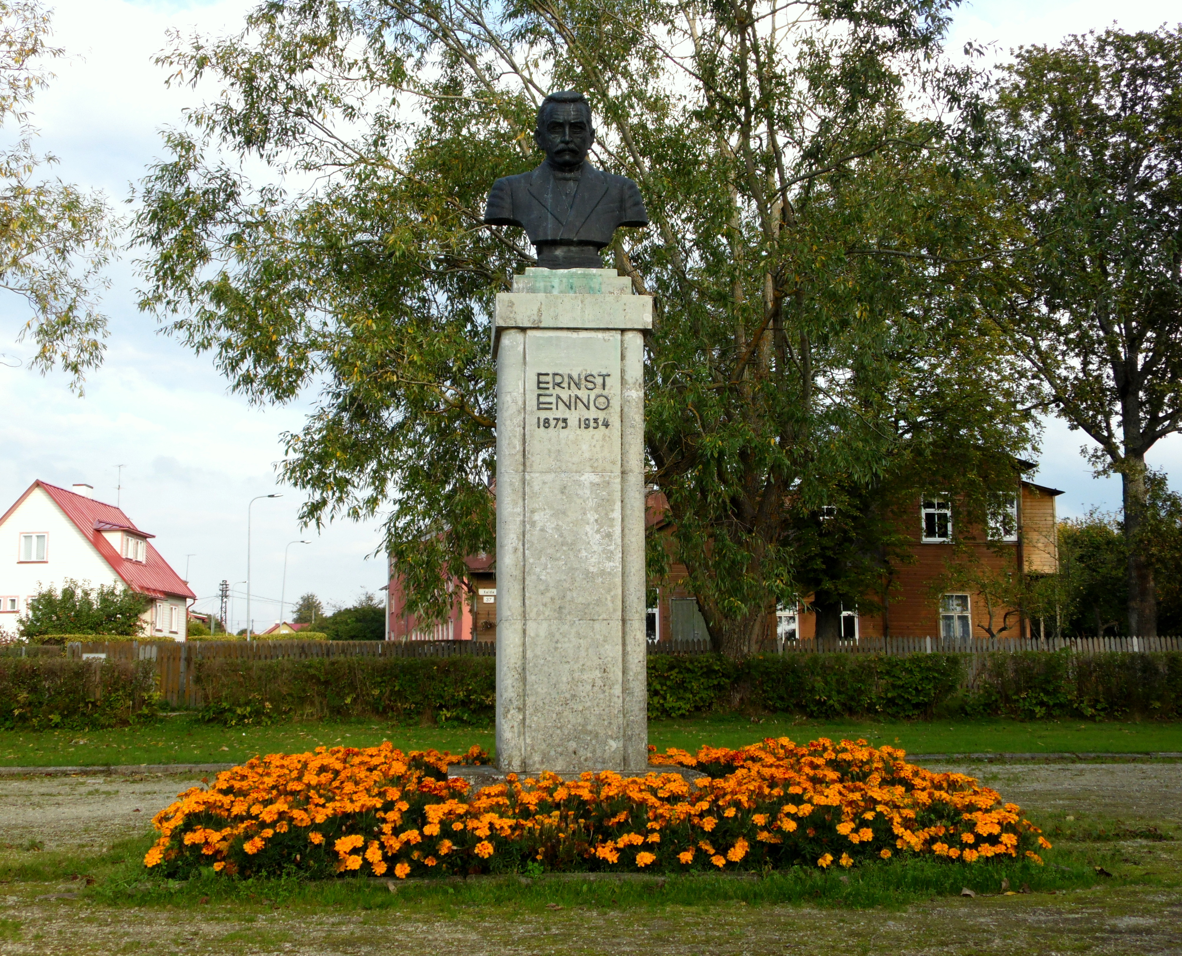 Ernst Enno mälestussammas. Kalda tn 28, Haapsalu